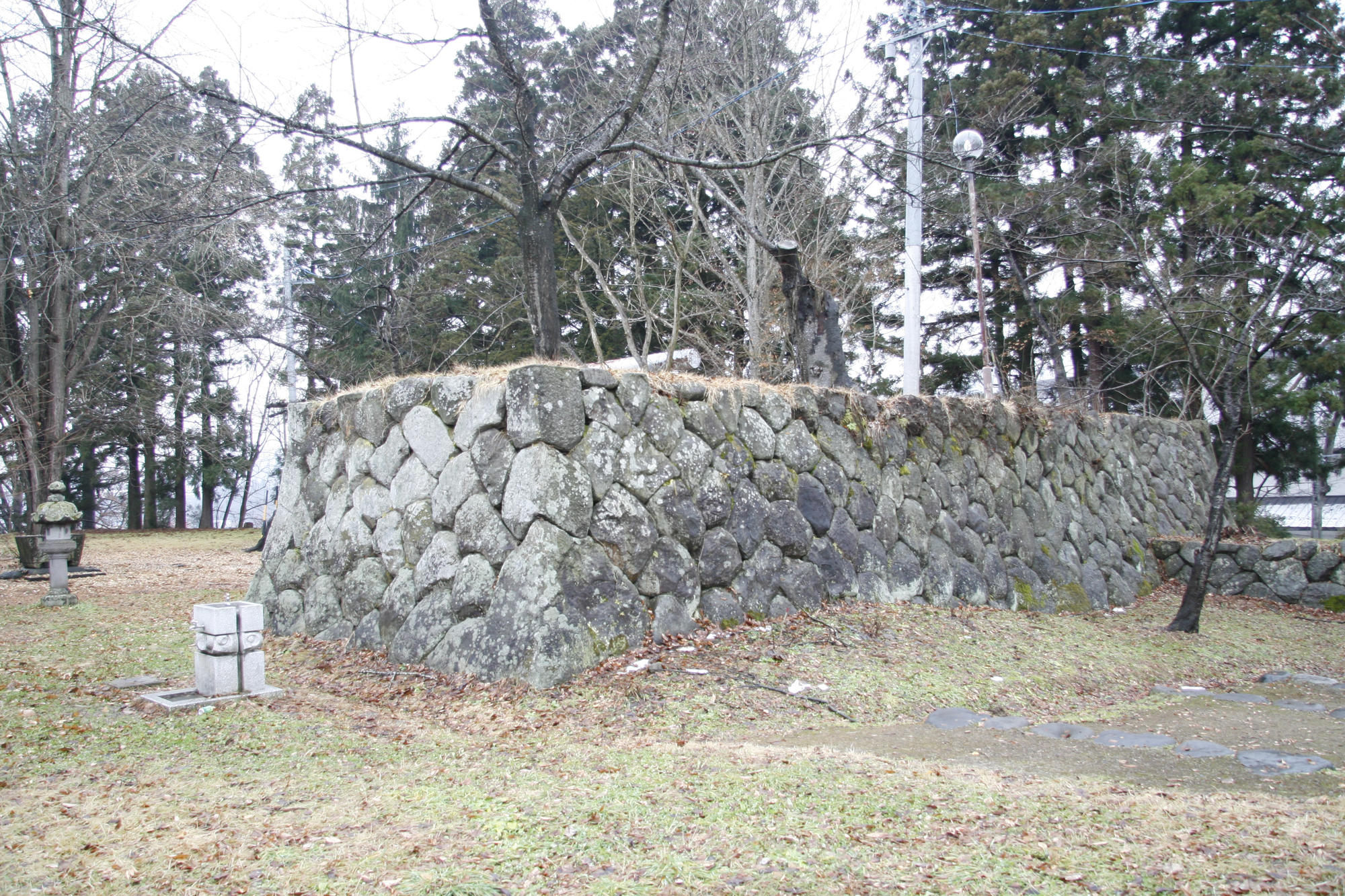 飯山城の石垣